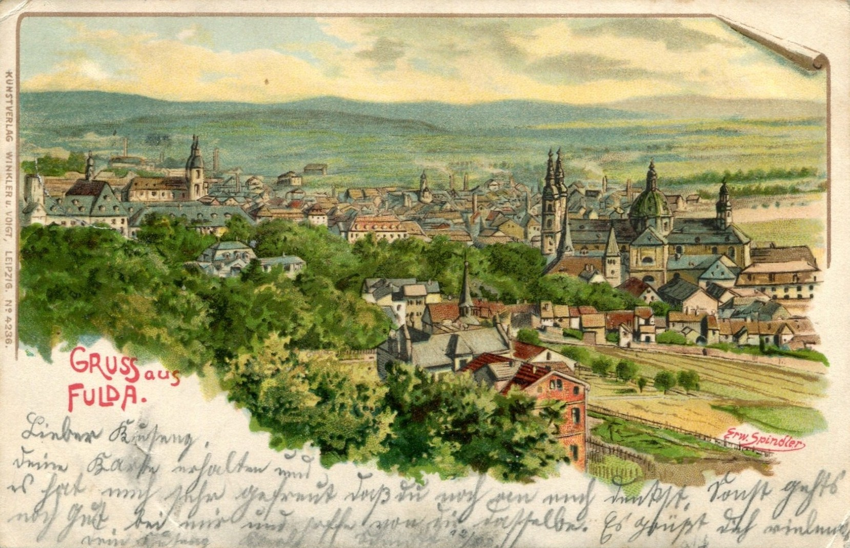 Titel: Gruss aus FULDA; Kartennummer: 4236; Signatur: Erw.Spindler; Signaturlage: rechts unten